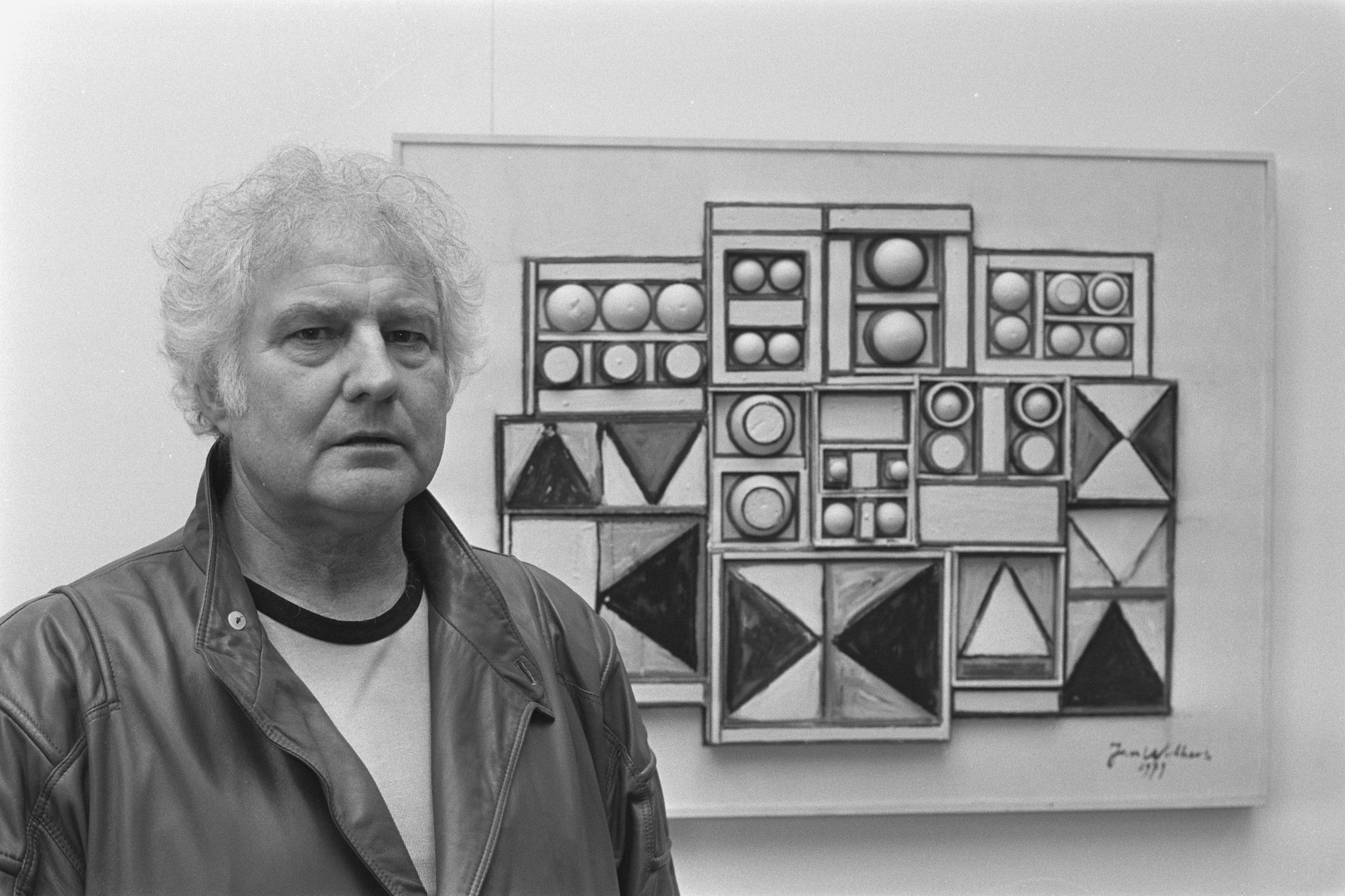 Tentoonstelling van beeldende kunst van Jan Wolkers in Leiden; Jan Wolkers bij een reliëf